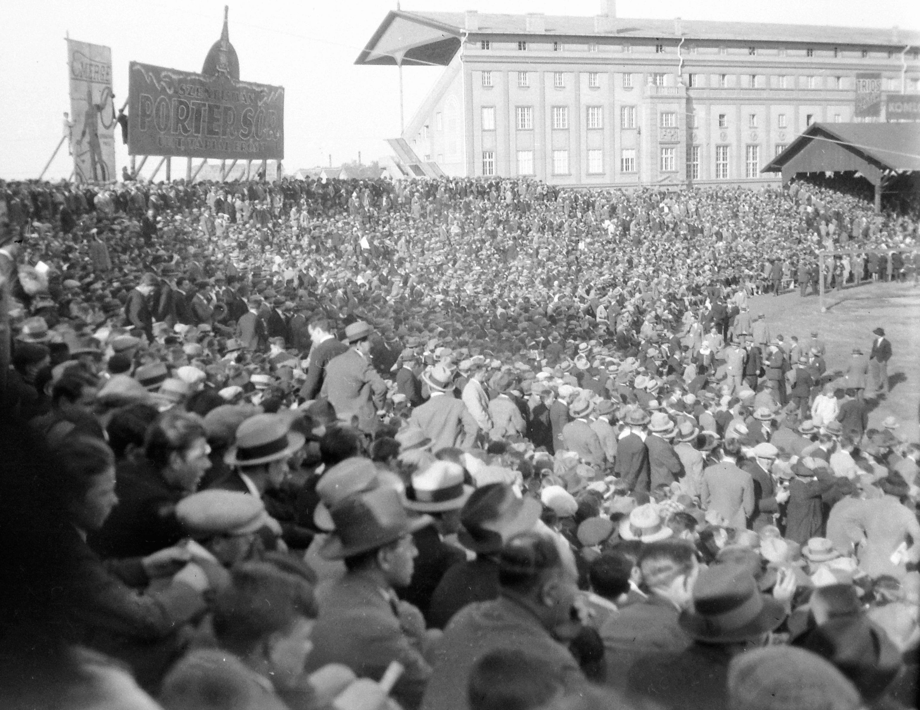 MTK stadion. Location: Hungary, Budapest VIII. Tags: ad, football, Budapest Title: MTK stadion.